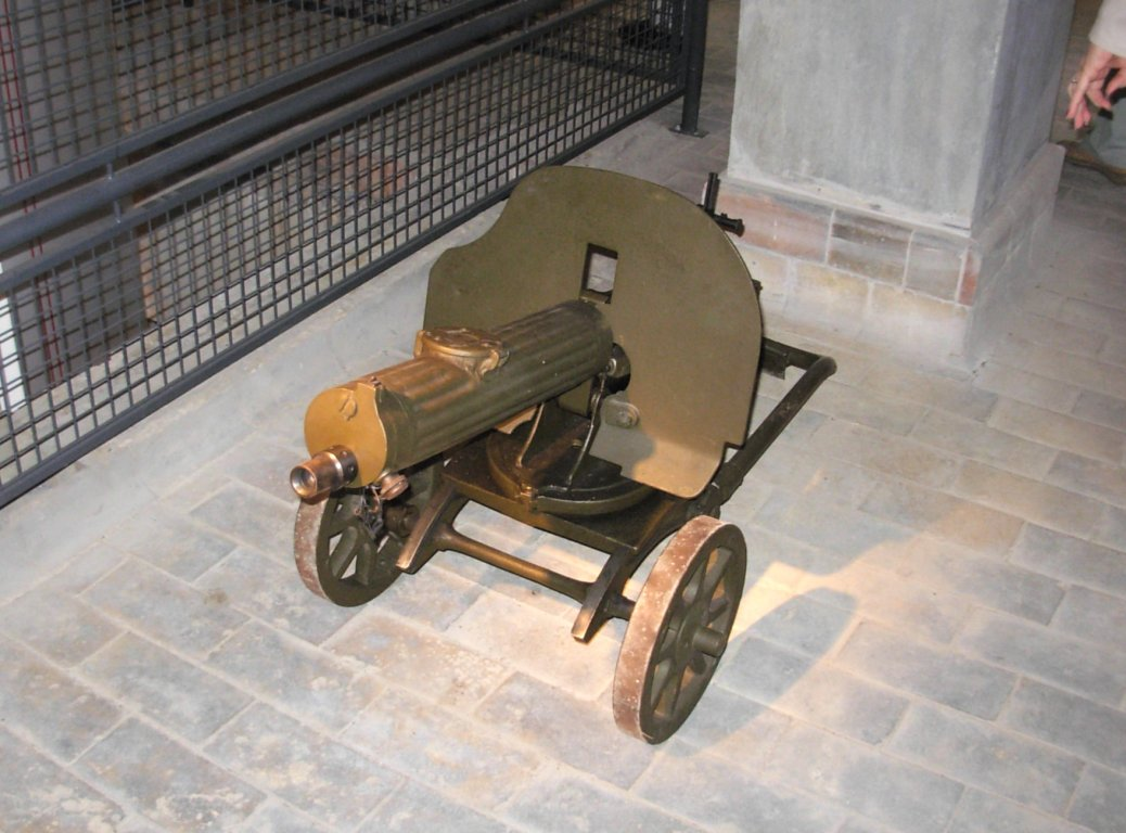 Eksploseum w Bydgoszczy - ekspozycja ubrojenia (rosyjski ckm Maxim z 1910 r.)